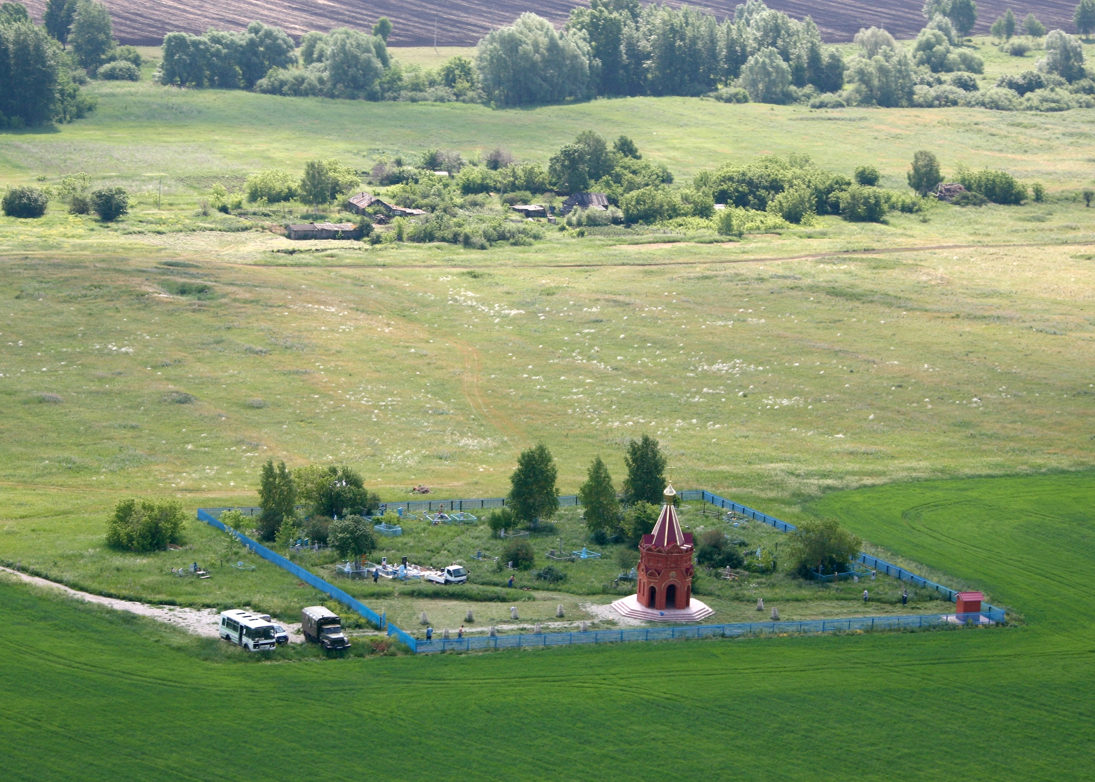 Возрождение Столяровки началось со строительства часовни на местном кладбище в 2006 году